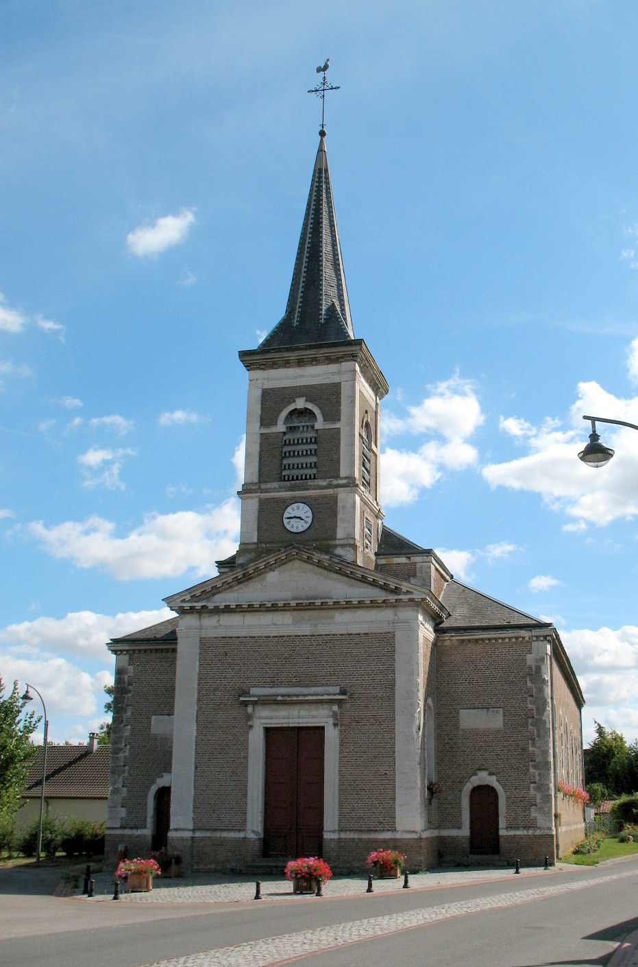 Construction de style néo-clasique du XIXe siècle, modifiée par l'adjonction d'une flèche néo-gothique.